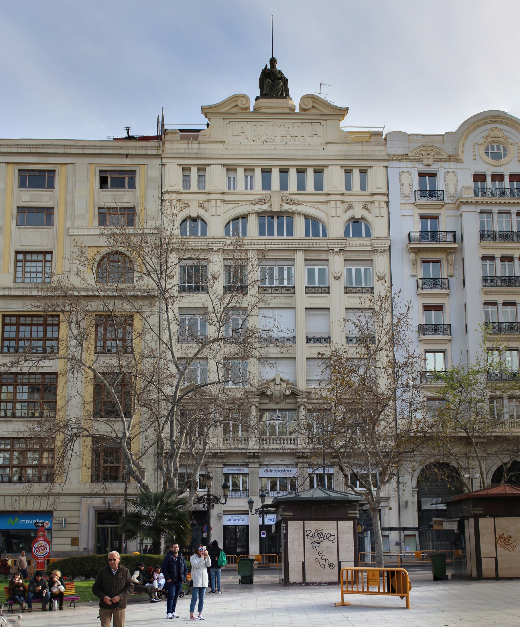 Edificio de La Equitativa de Vicente Rodríguez Martín en Valencia